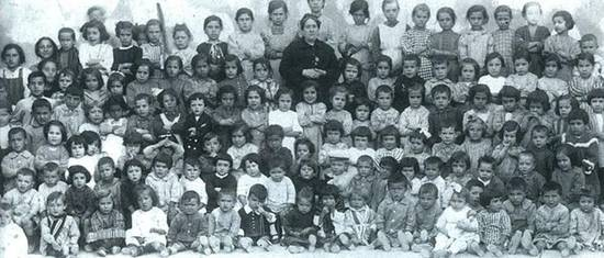 La maestra Dª Juana Cordón junto a los niños del parvulario.